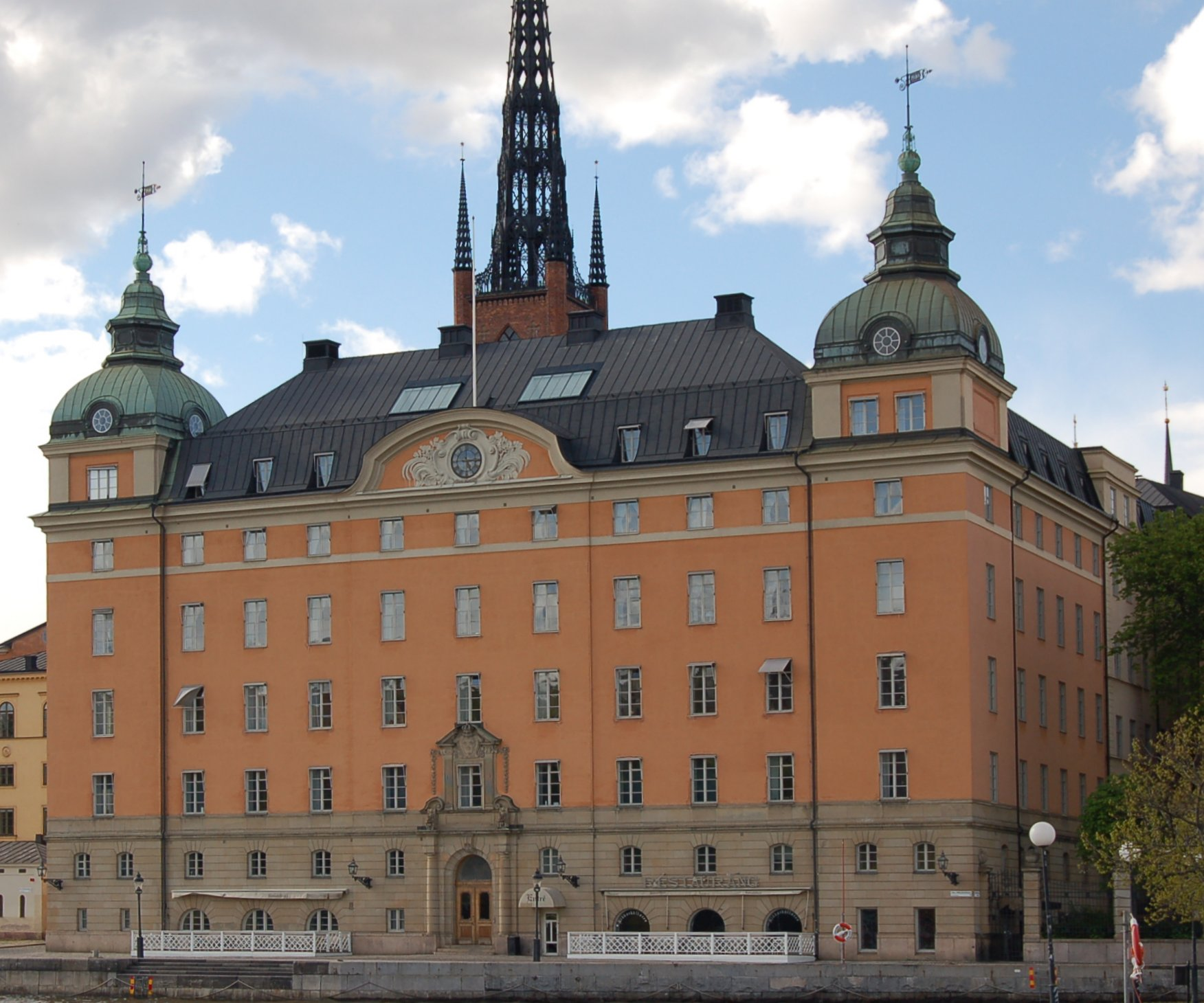 Gamla Riksdagshuset i Stockholm från sjösidan